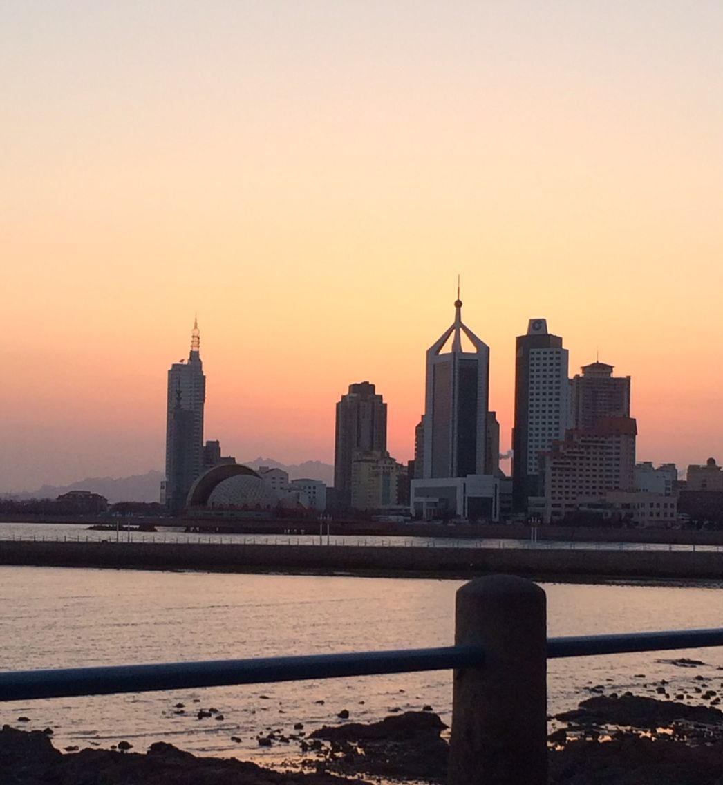 XiaoYu hill in Qingdao Ira